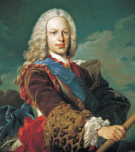 Retrato del rey Fernando VI de España (1713-1759), que fue hijo del rey Felipe V de España y de la reina María Luisa Gabriela de Saboya.